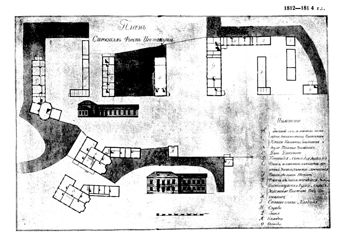 Санкт-Петербургский Форст Институт (1811—1813). Практическое лесное училище было переведено в Санкт-Петербург (1811), к училищу были присоединён Орловский практическо-теоретический лесной институт — новое учебное заведение стало именоваться Санкт-Петербургский Форст Институт.